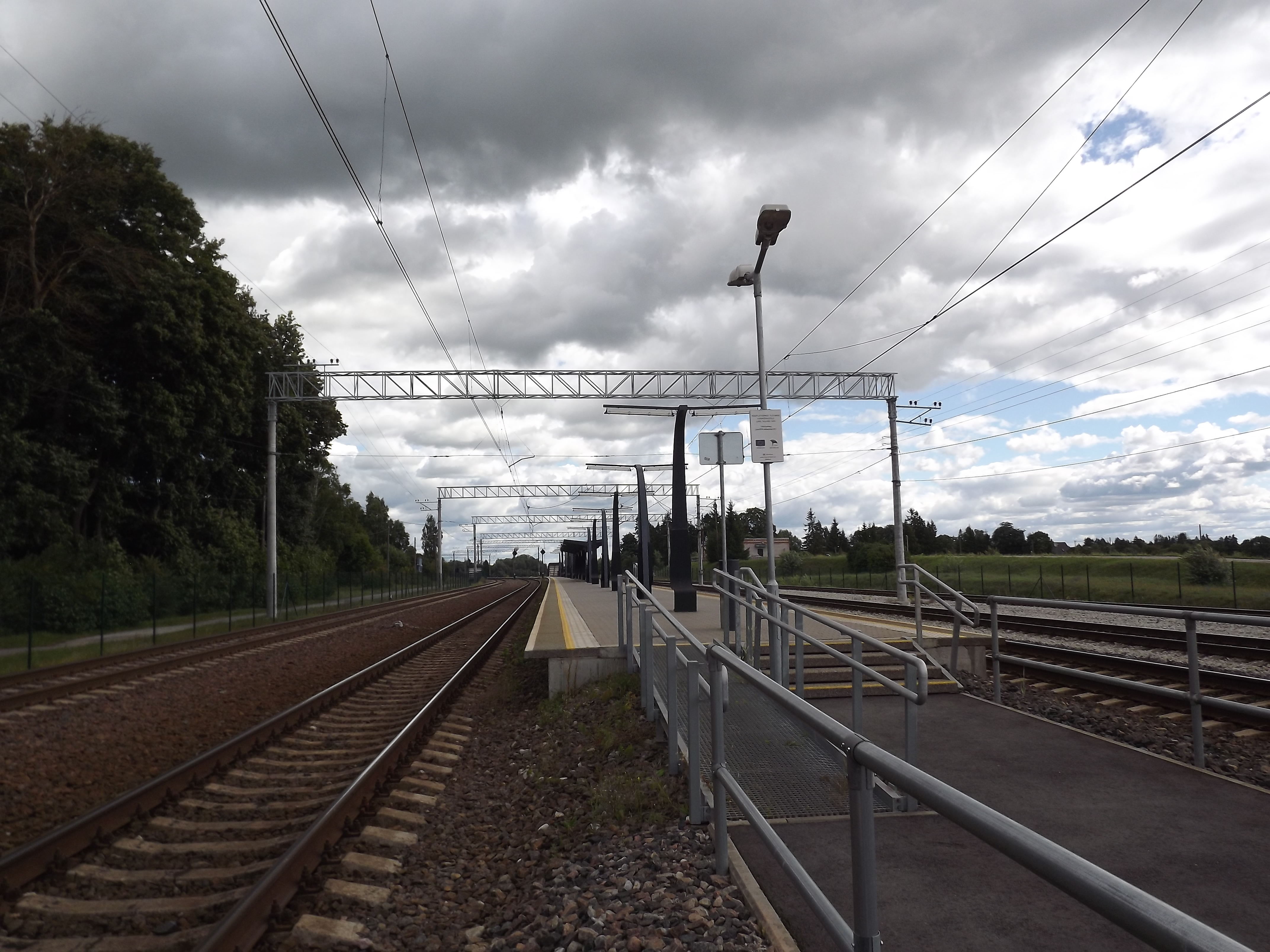 Lagedi raudteejaam